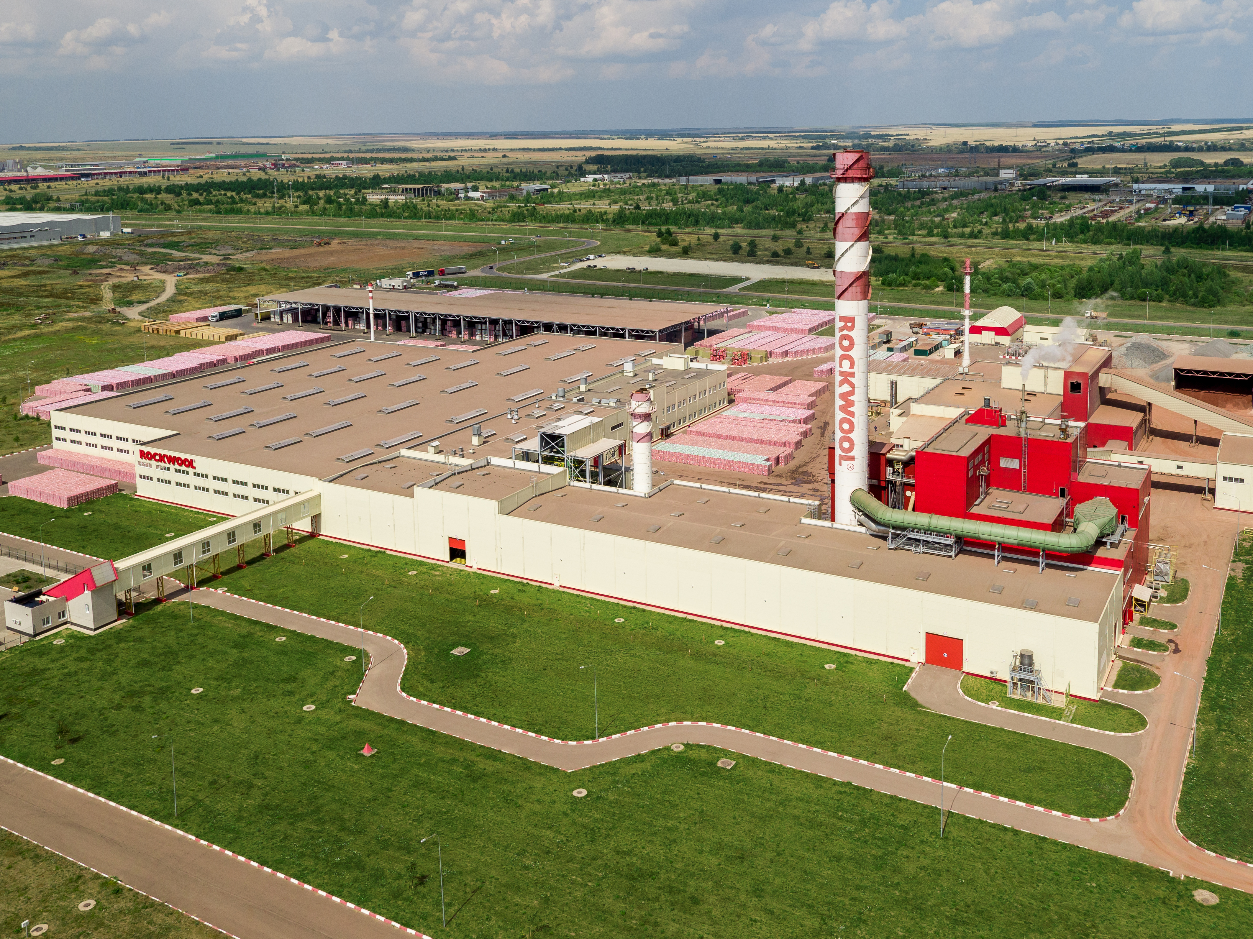 Особая экономическая зона «Алабуга», Завод «Роквул-Волга»